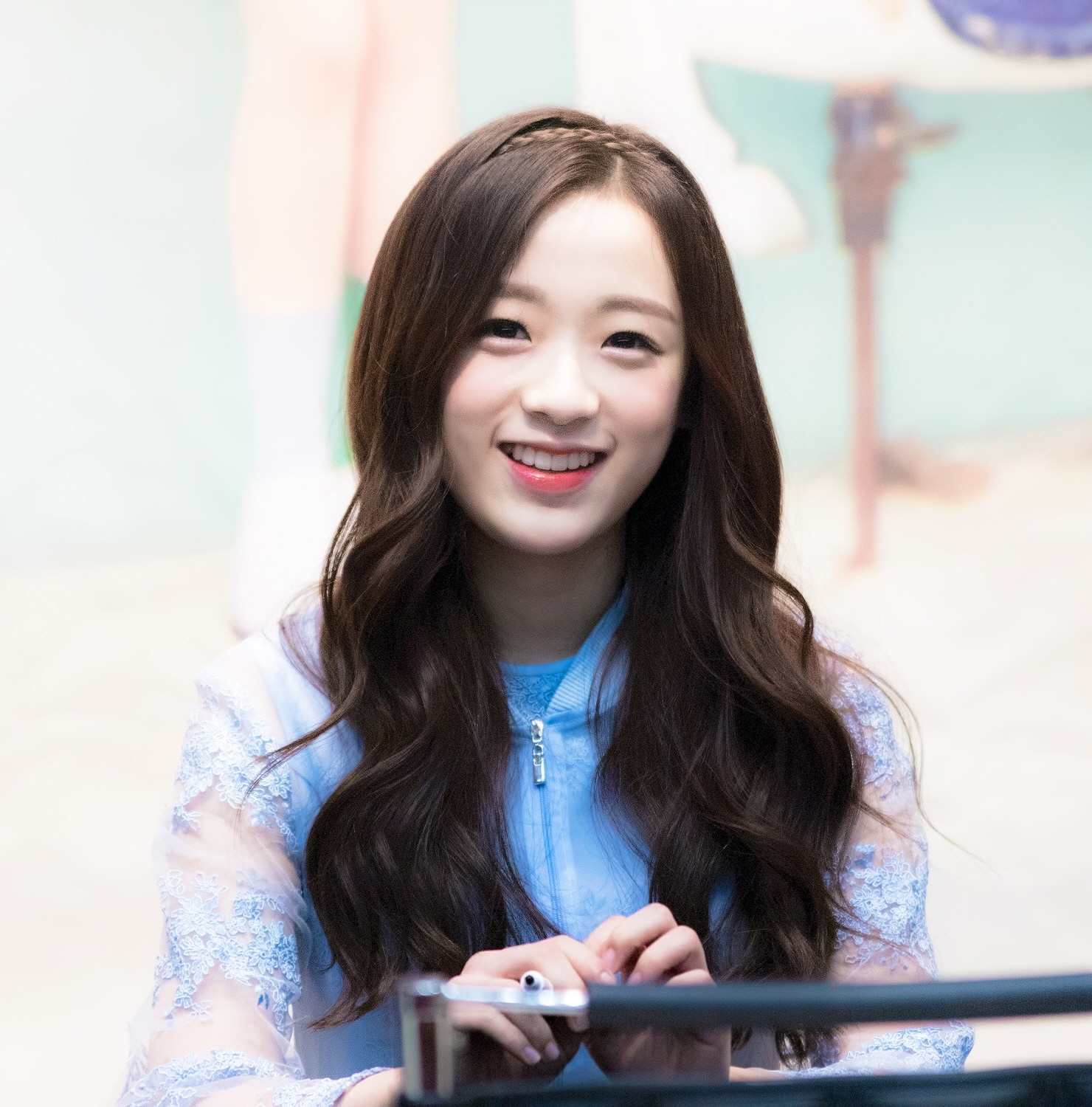 170115 목동 APRIL 팬싸인회 진솔 9Pic